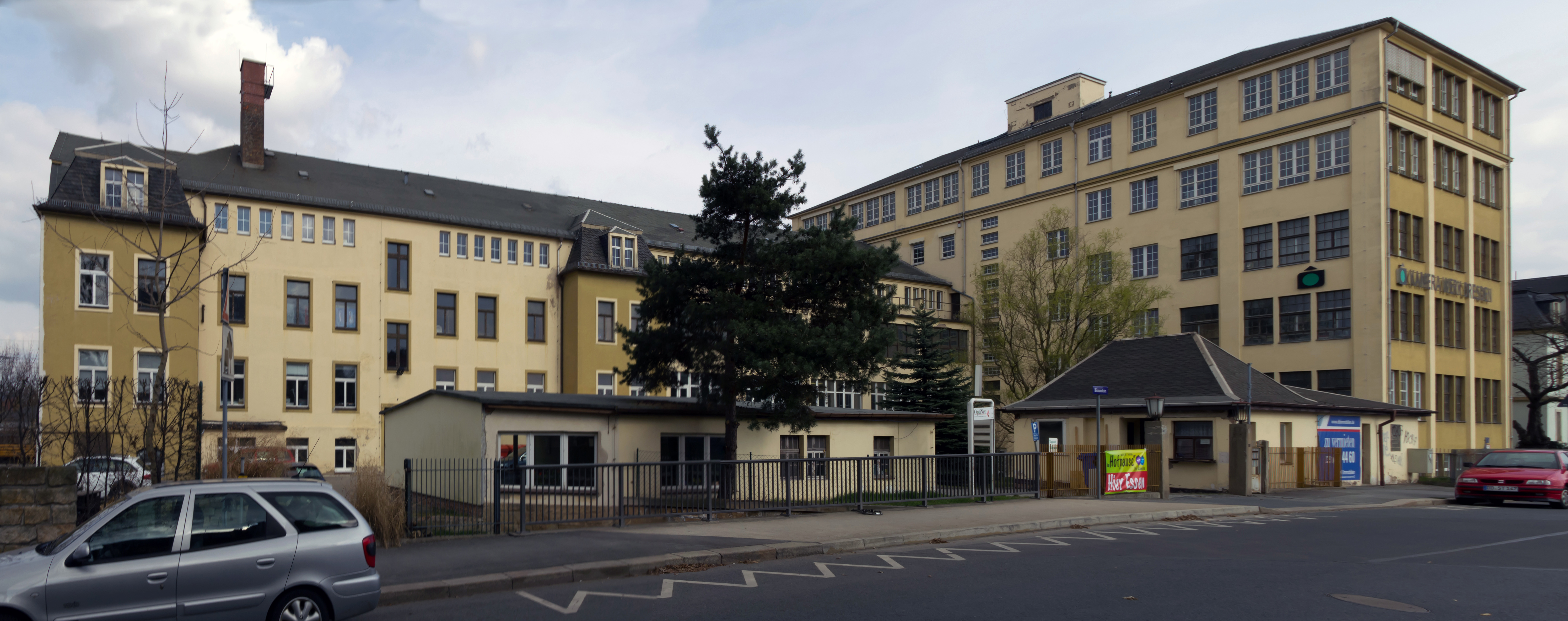 Kamera-Werke Niedersedlitz